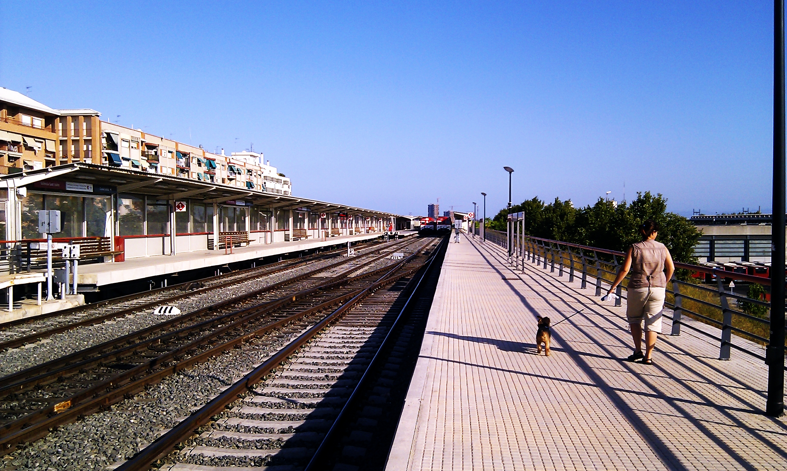 Nueva estación de Cercanías de Sant Isidre, Valencia